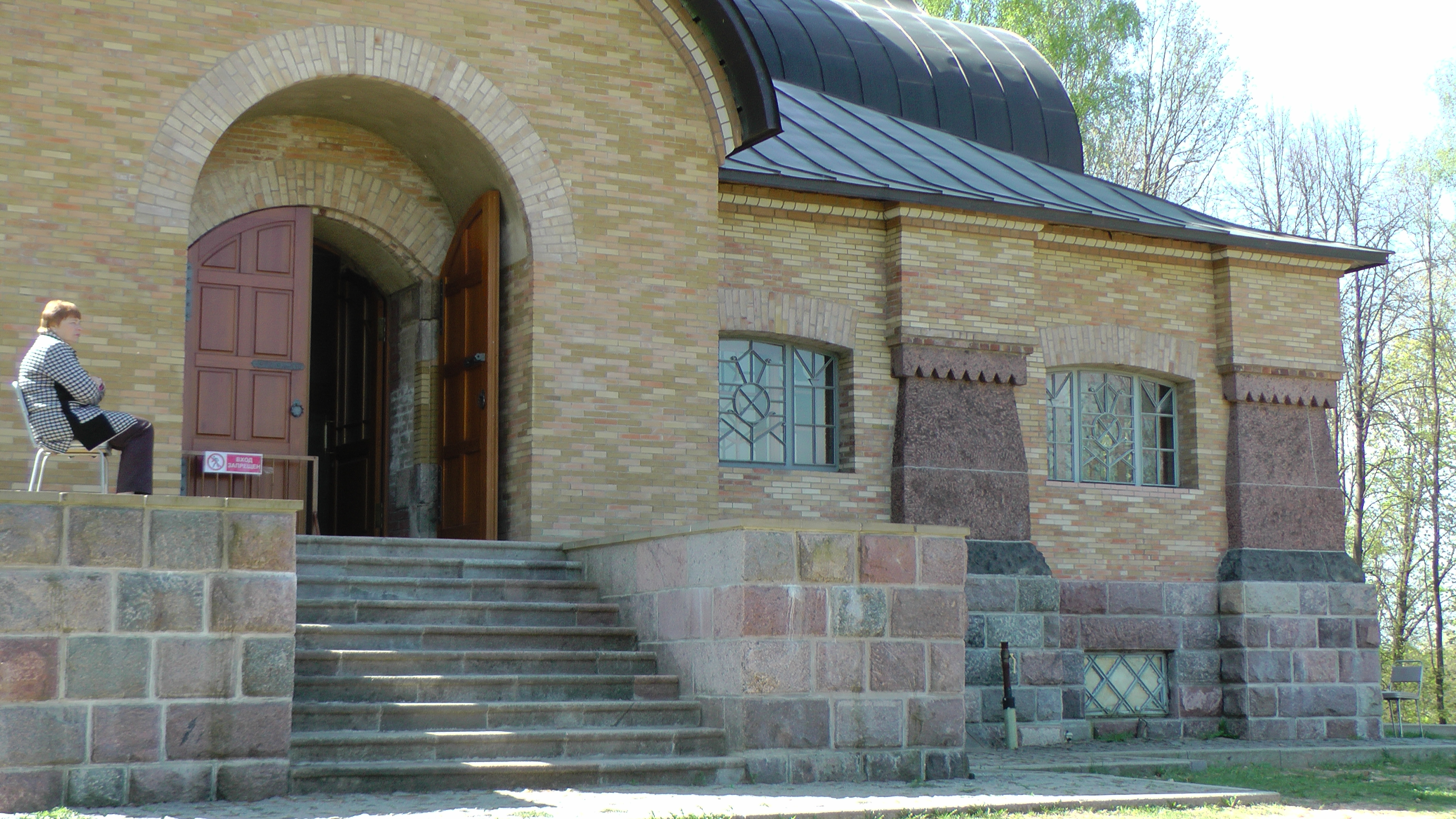 Храм Святого Духа. Обходная внутренняя галерея для крестного хода. Архитектор С. В. Милютин.